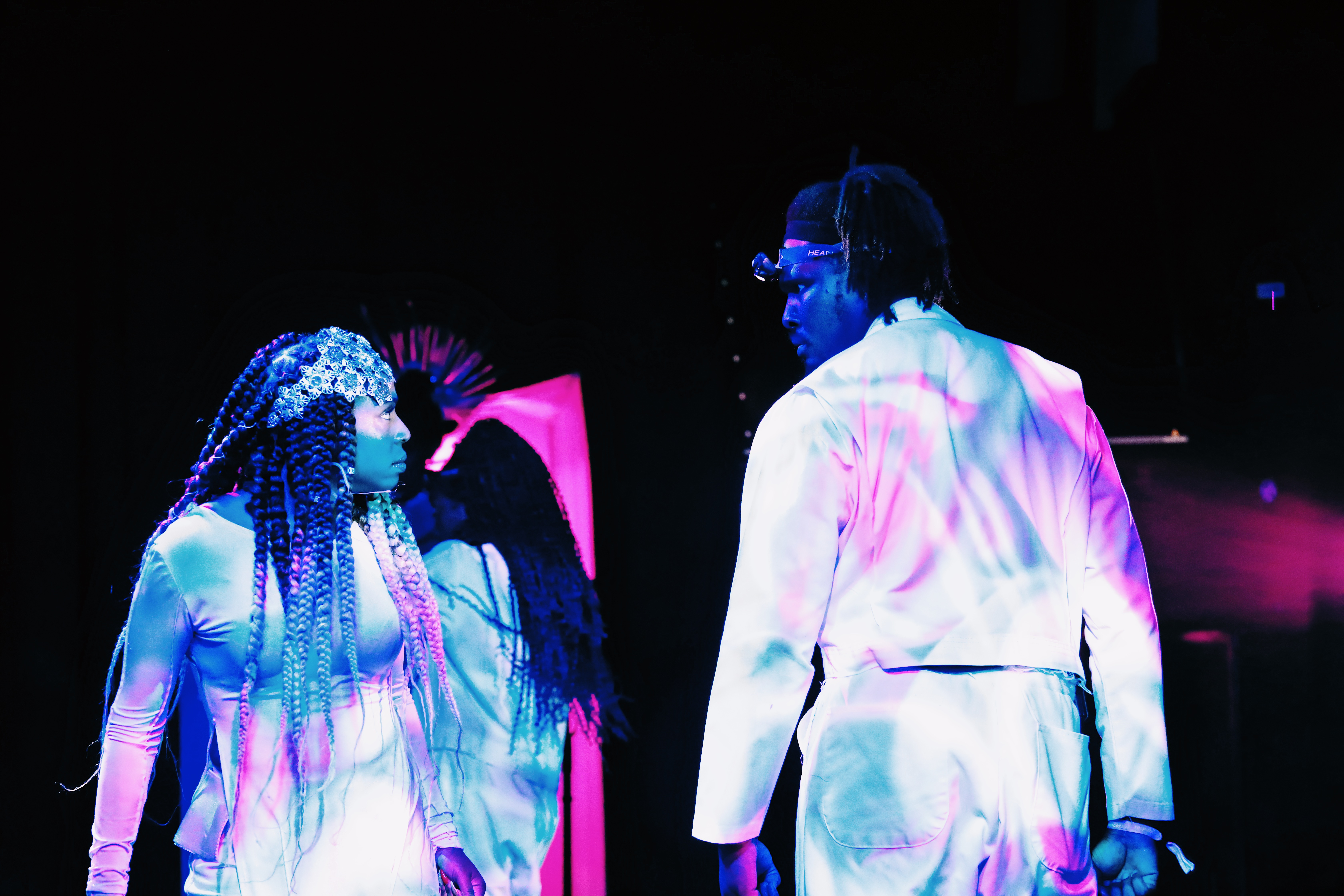 re:publica on Sequencer Tour